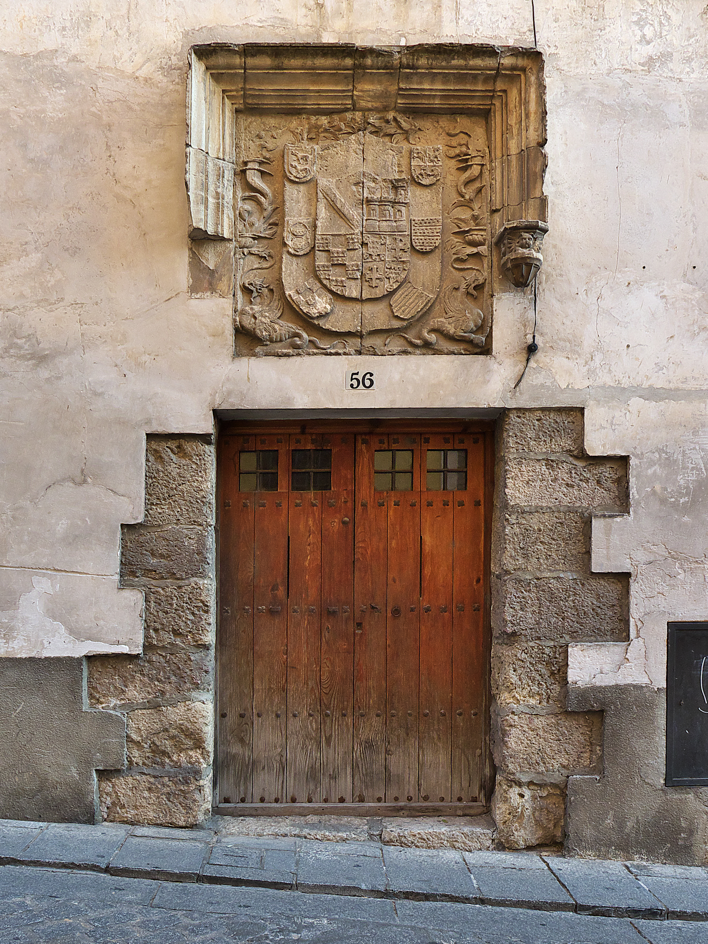 Calle de San Pedro, Cuenca. Escudo nobiliario de los Carrillo de Mendoza, perteneciente a Diego Carrillo de Mendoza, III Conde de Priego, casado doña Guiomar de Mendoza.